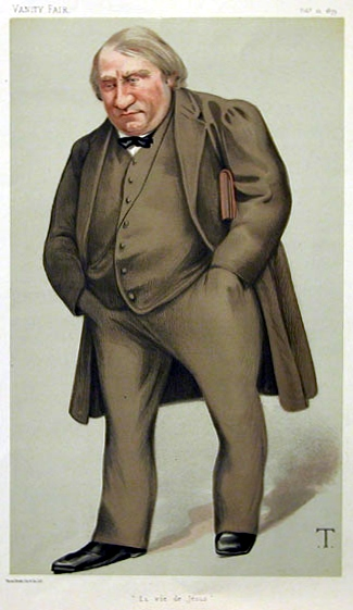 Caricature of Ernest Renan. Caption read "La vie de Jésus".